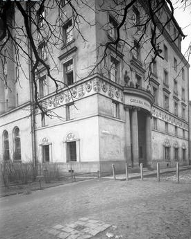 Gmach banku przy ulicy św. Tomasza w Krakowie-wejście do giełdy pieniężnej, fotografia pochodząca z archiwum Koncernu Ilustrowanego Kuriera Codziennego. Obecnie Gmach Akademii Muzycznej w Krakowie